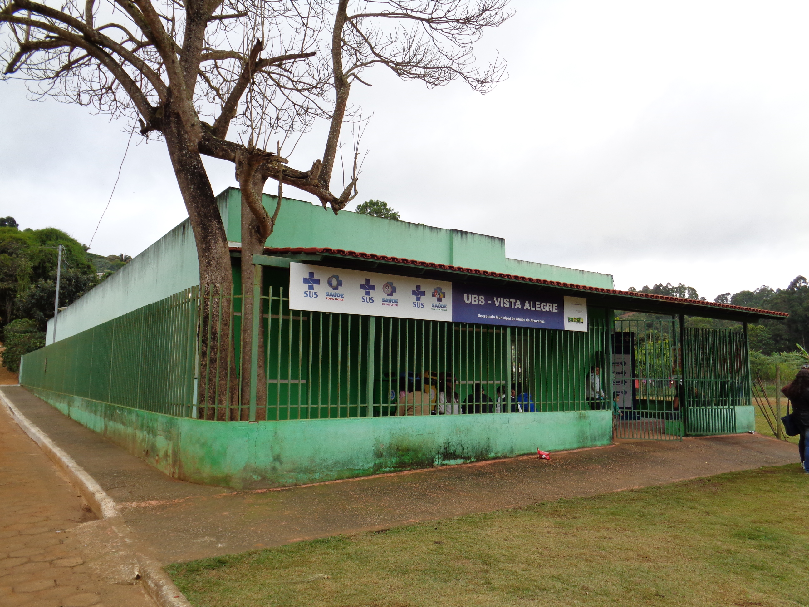 Unidade Básica de Saúde no distrito de Vista Alegre, no município de Alvarenga, em Minas Gerais, Brasil.